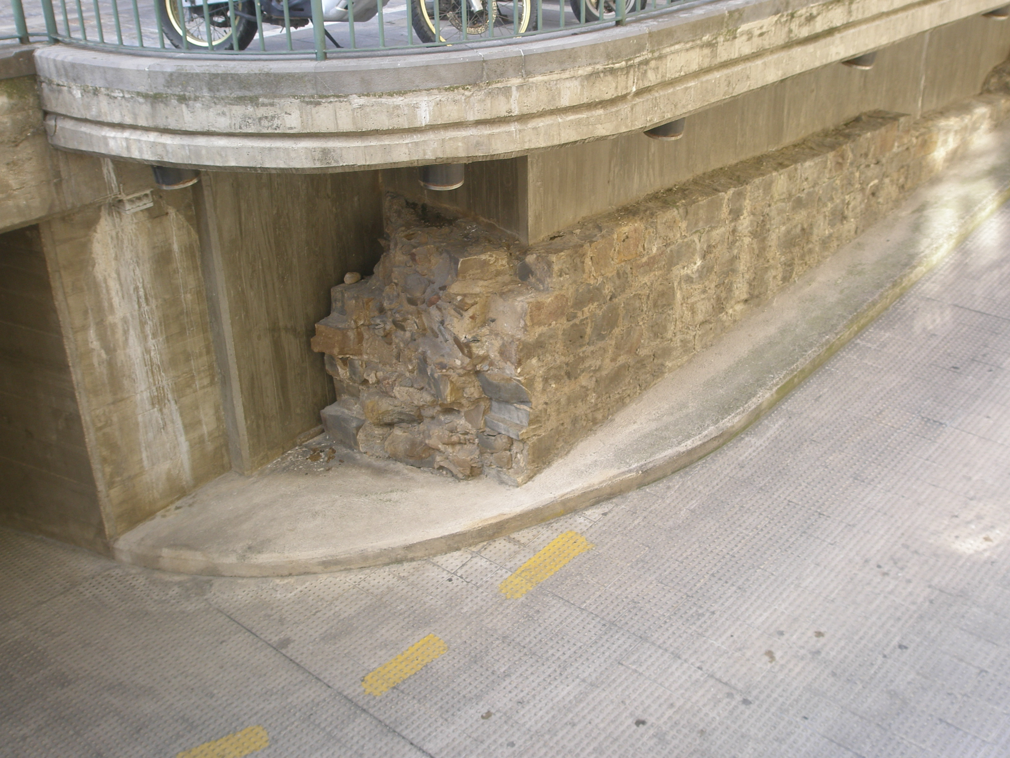 Antigua muralla del burgo medieval pamplonés de San Cernin